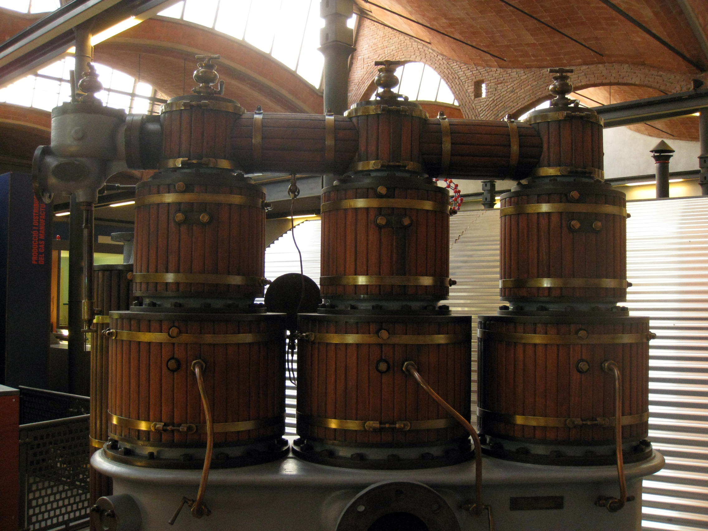 Fàbrica Aymerich, Amat i Jover (Terrassa) Object location41° 33′ 54.49″ N, 2° 00′ 28.14″ E